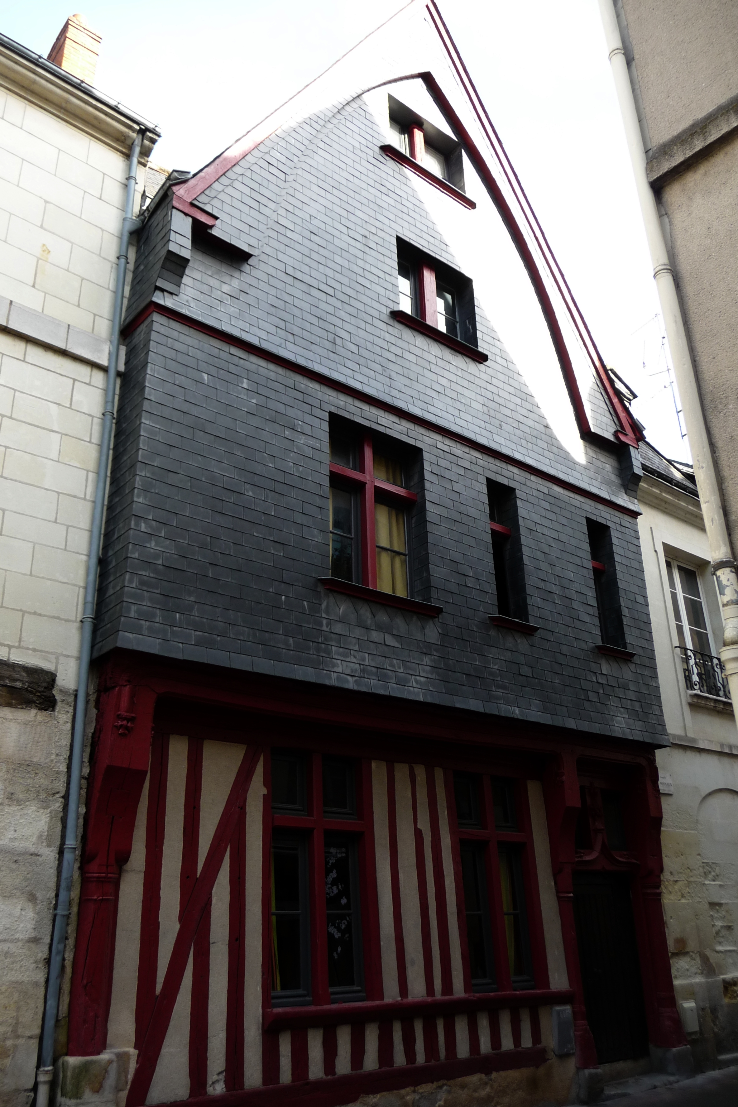 Maison (Inscrit), lieu de naissance de Jules Moineaux. .